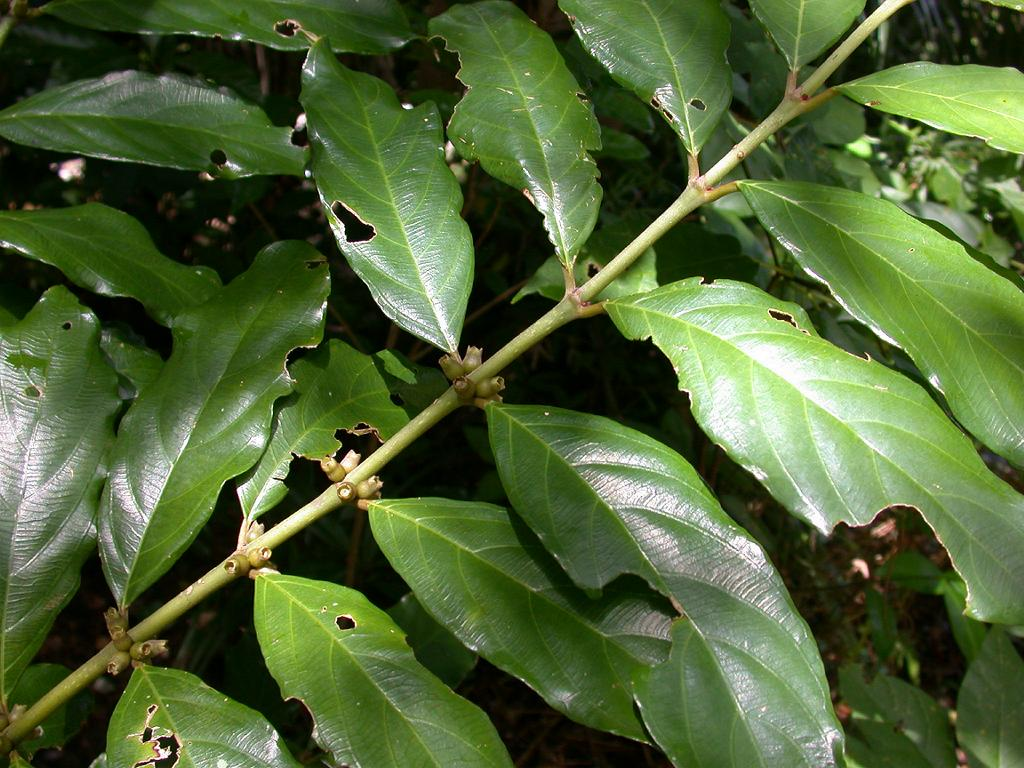 Lasianthus verticillatus：オオバルリミノキ 2006/8/11 沖縄本島：Okinawa Island, Japan